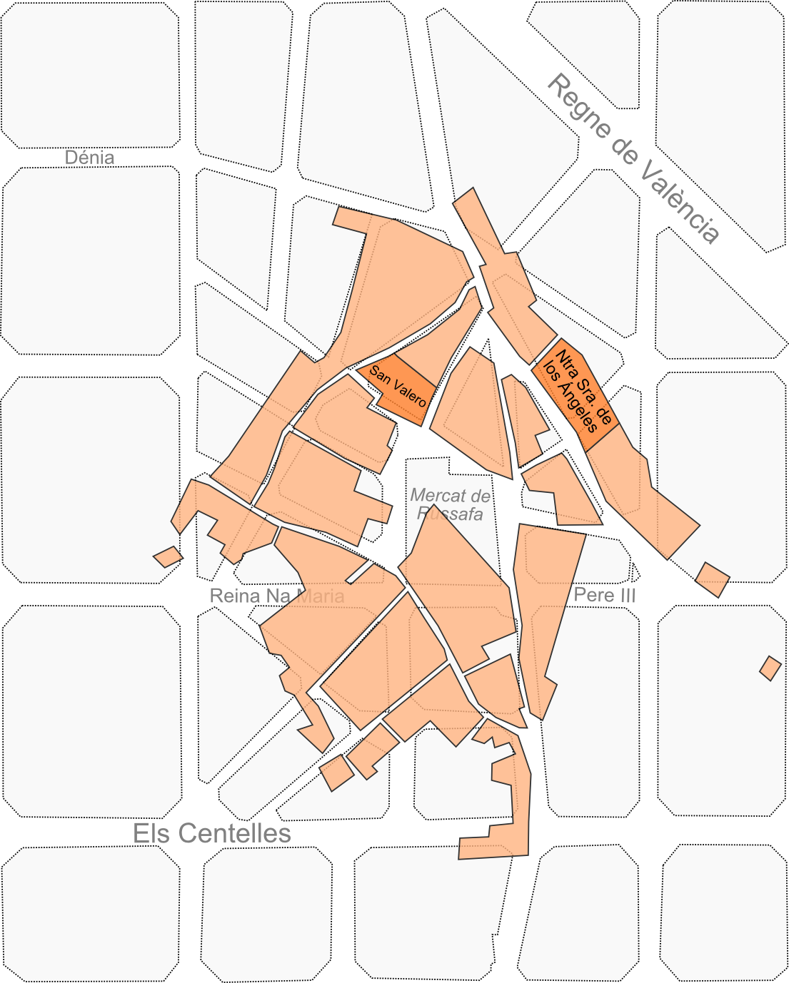 Plànol de Russafa entre el 1811 i 1883 superposat al plànol actual de València. Pot observar-se la remodelació dels carrers i de quina manera van influir al pla ortogonal de l'eixample.